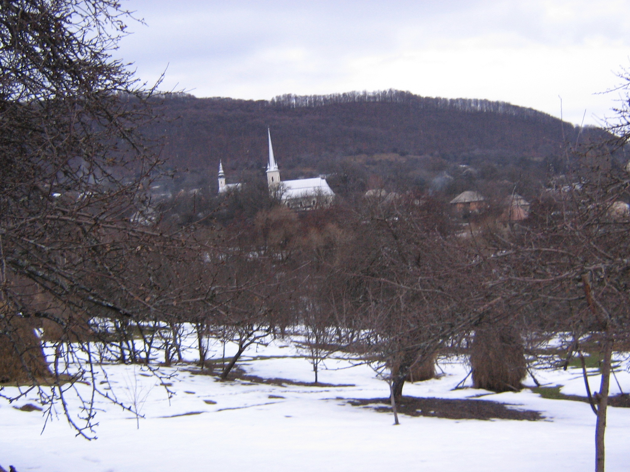 vedere iarna